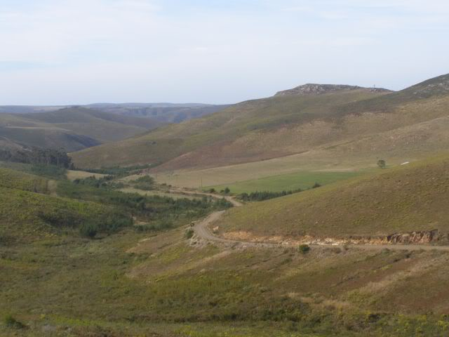 'n Deel van die pas.